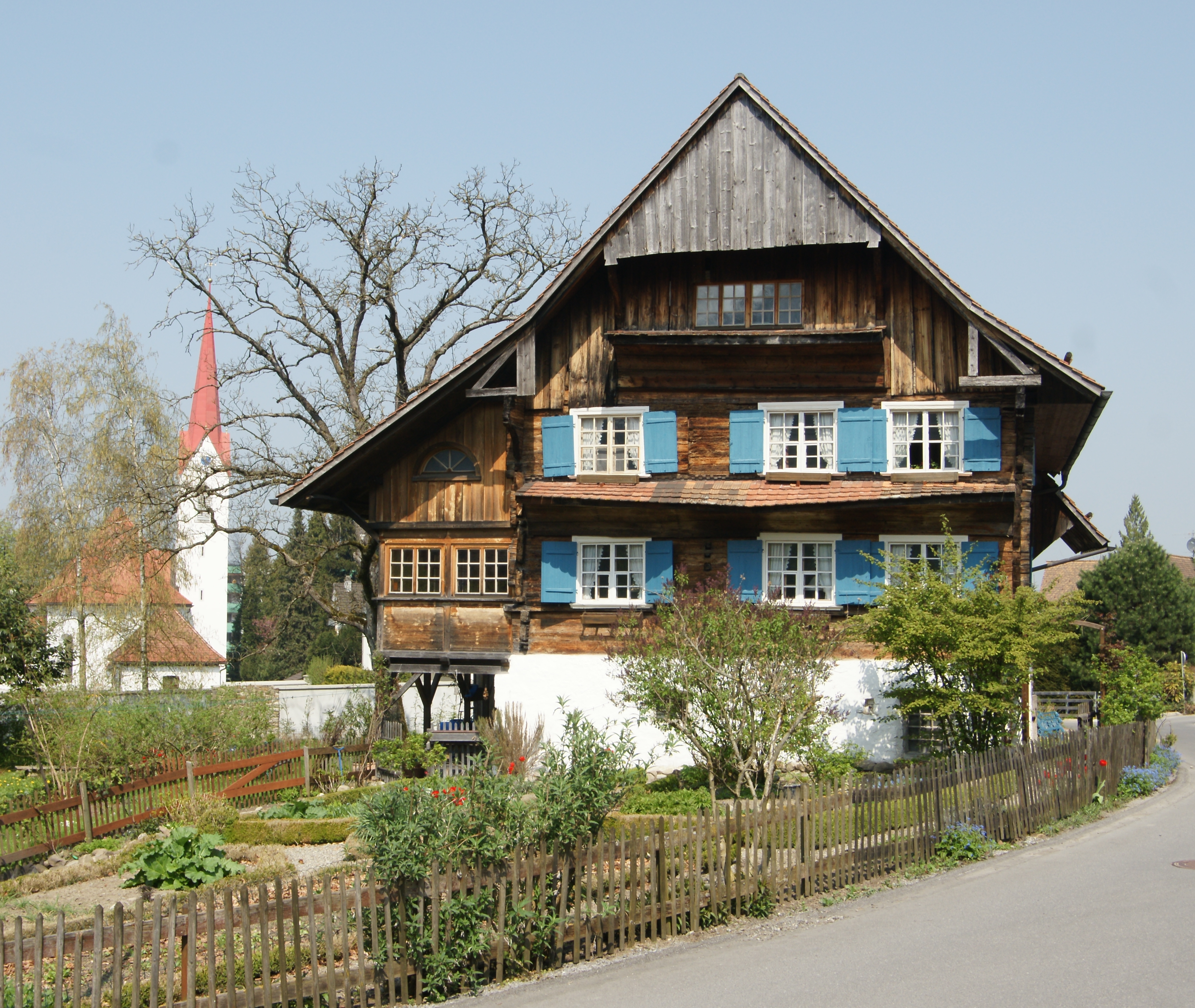 aus dem DEHIO Vorarlberg 1983: Mitteldorfgasse (Haselstauden ) Nr.10: Rheintalhaus, Einhof, Wohnteil 18.Jh. (?), Blockbau mit Kopfstrick auf hohem Kellersockel, traufseitiger Schopf, Klebdäcker, Giebel und Flugstreben verschalt, geschweifte Pfettenköpfe.